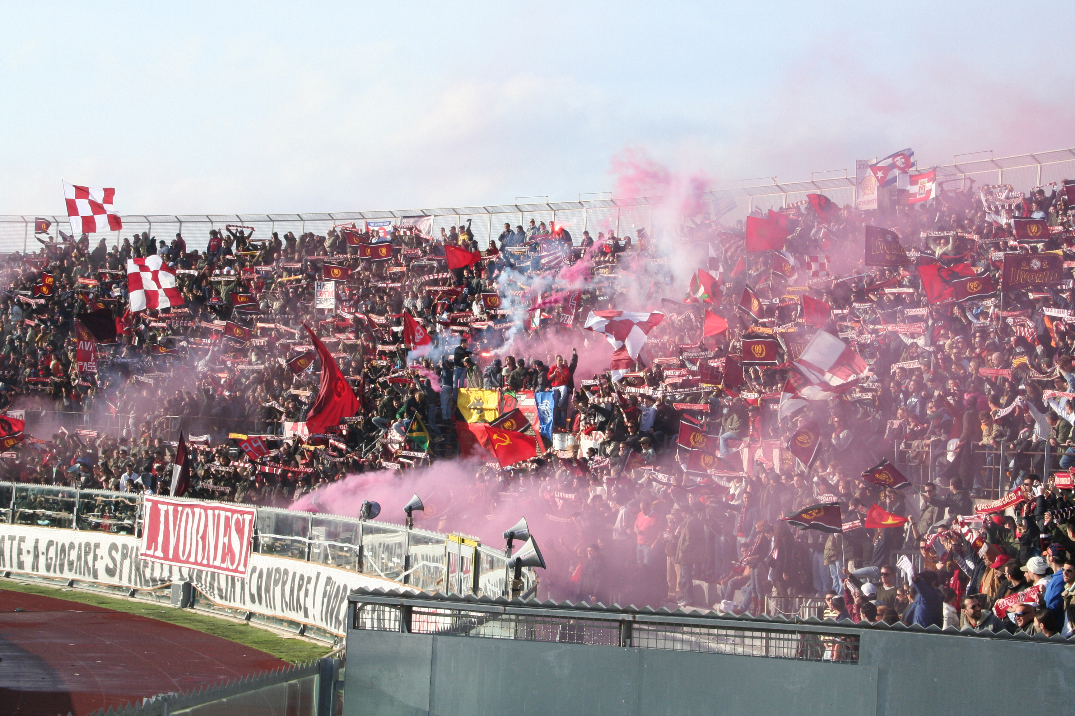 Livorno Roma 11 - 2006/2007 - Curva Nord, forza Livorno!